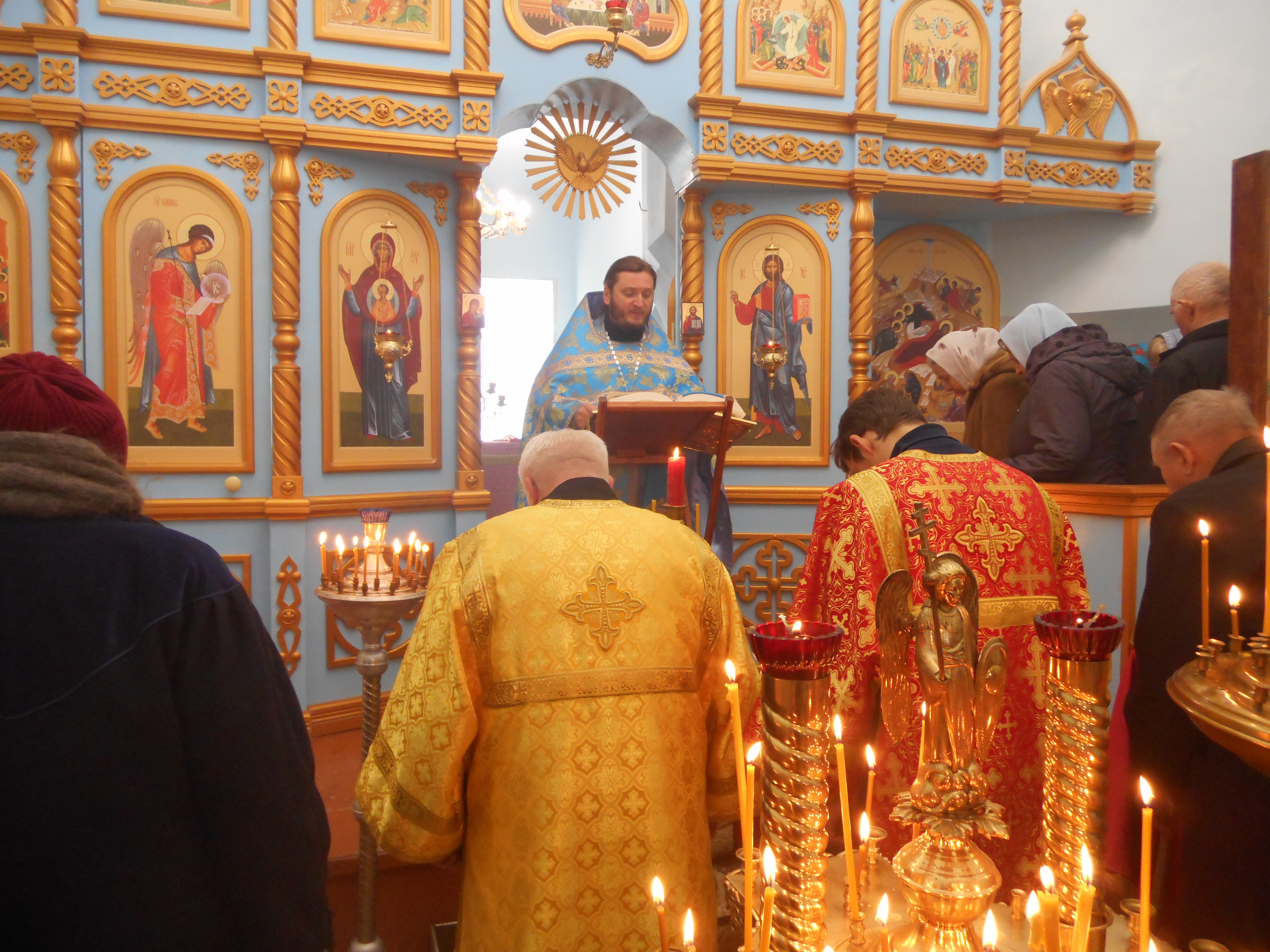 Церковь Рождества Христова (Белгородская область, Старооскольский округ, село Солдатское)